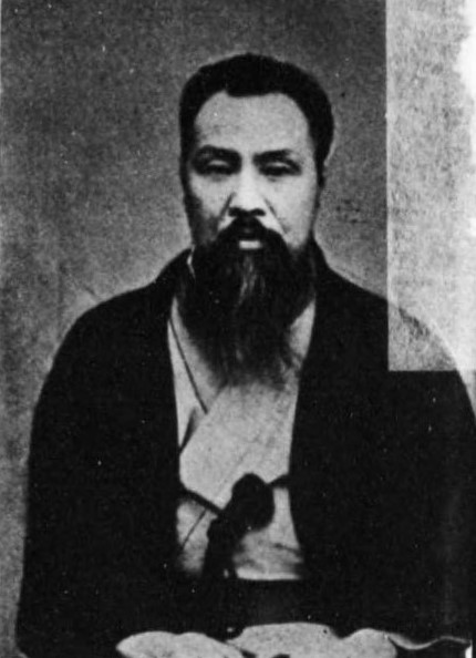 田部長右衛門（１８５０～１９４２）